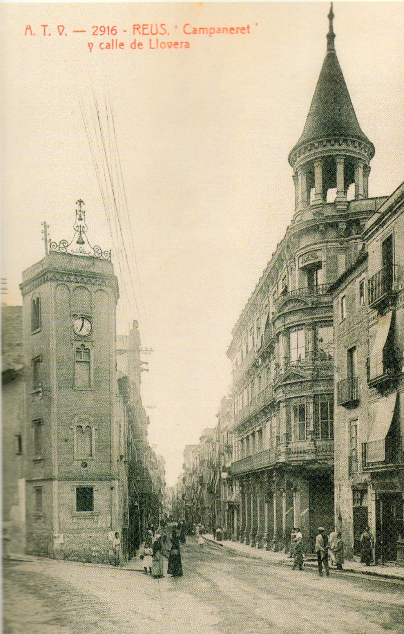 Edifici del Campanaret al capdamunt del carrer de Llovera a Reus